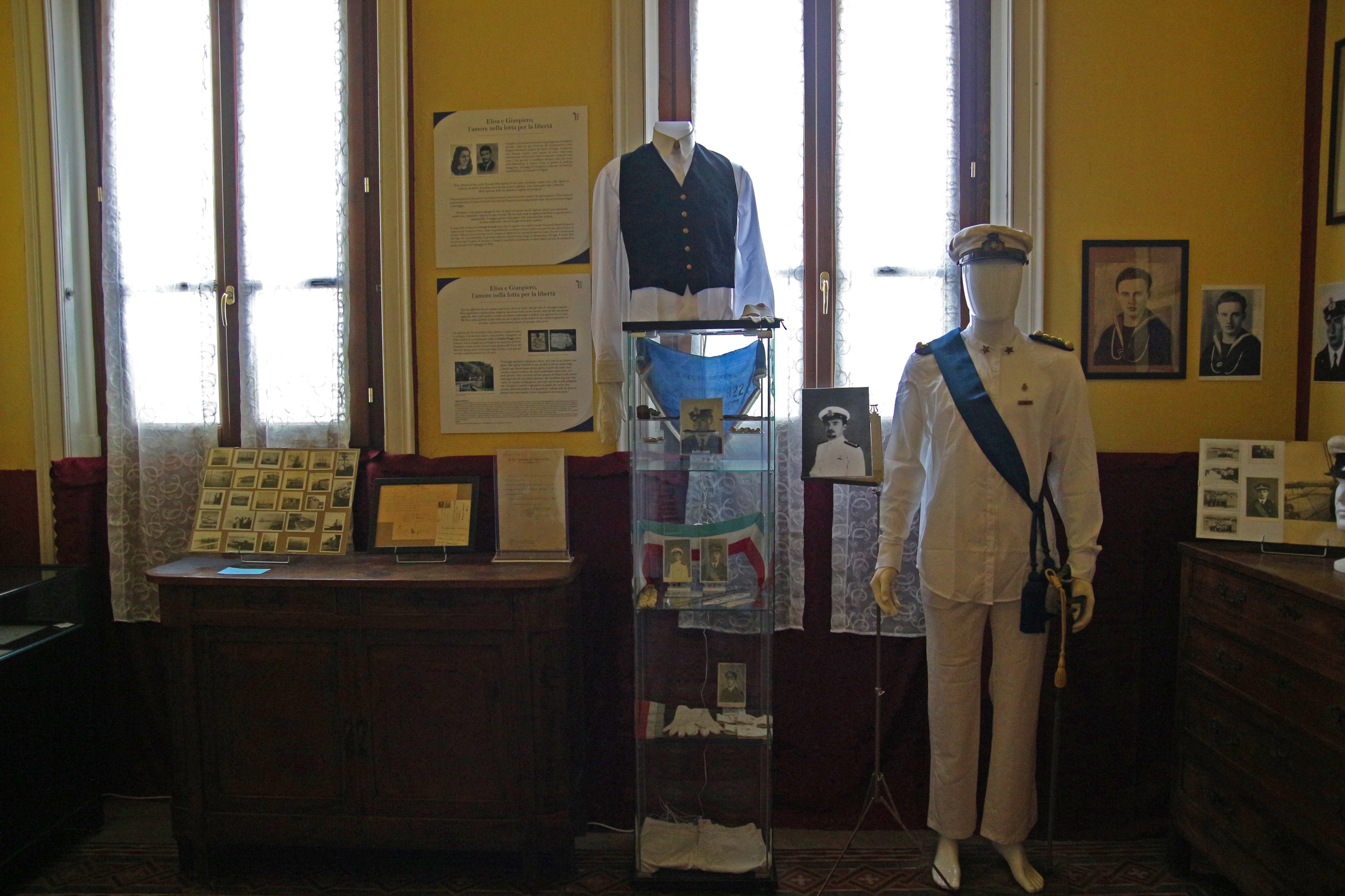 Sala "Leopoldo Fagnani", con l'esposizione di docuenti e oggetti legati a "Poldino" e alla guerra di Liberazione.